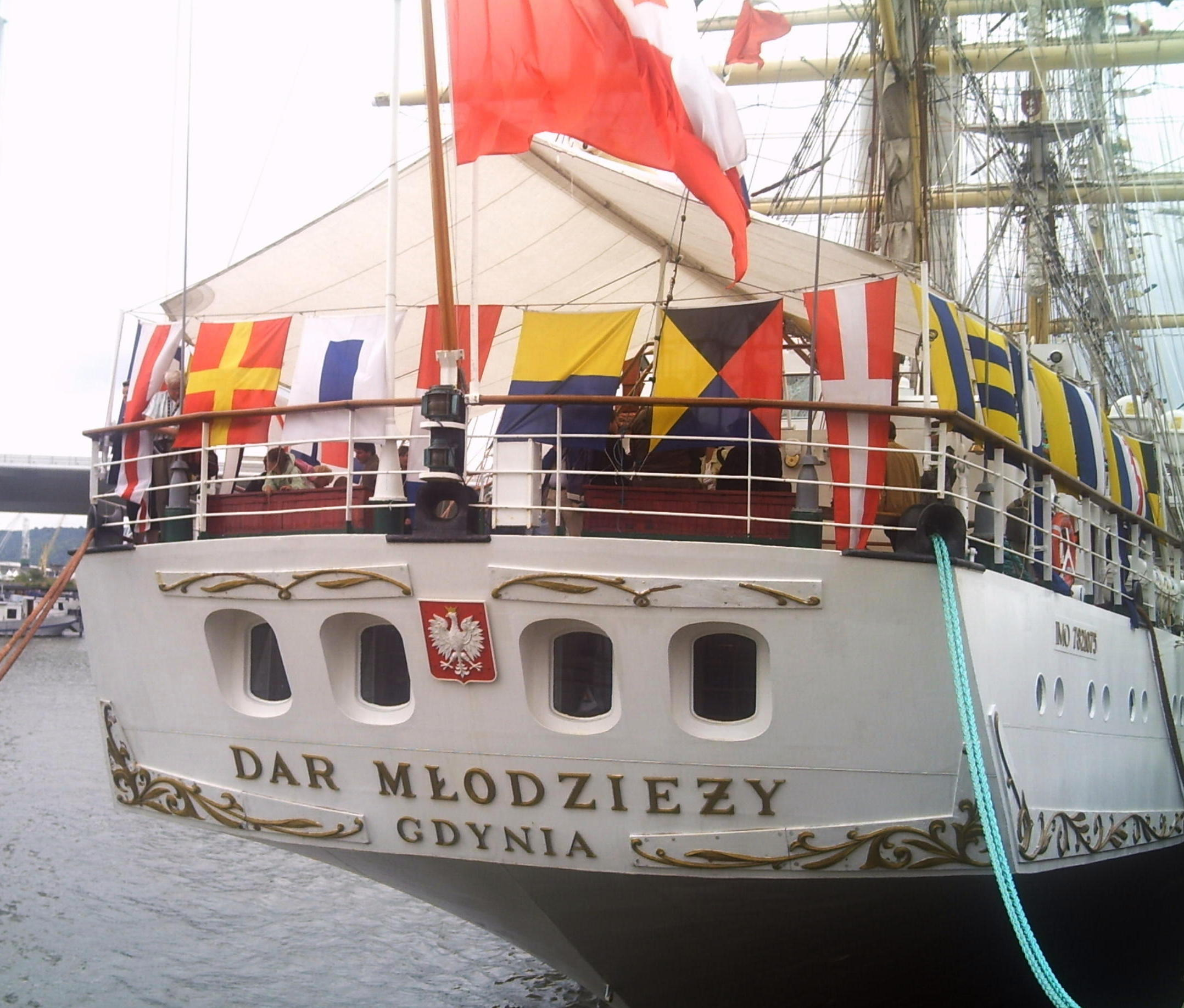 Le "Dar Mlodziezy" (Armada 2008 à Rouen)